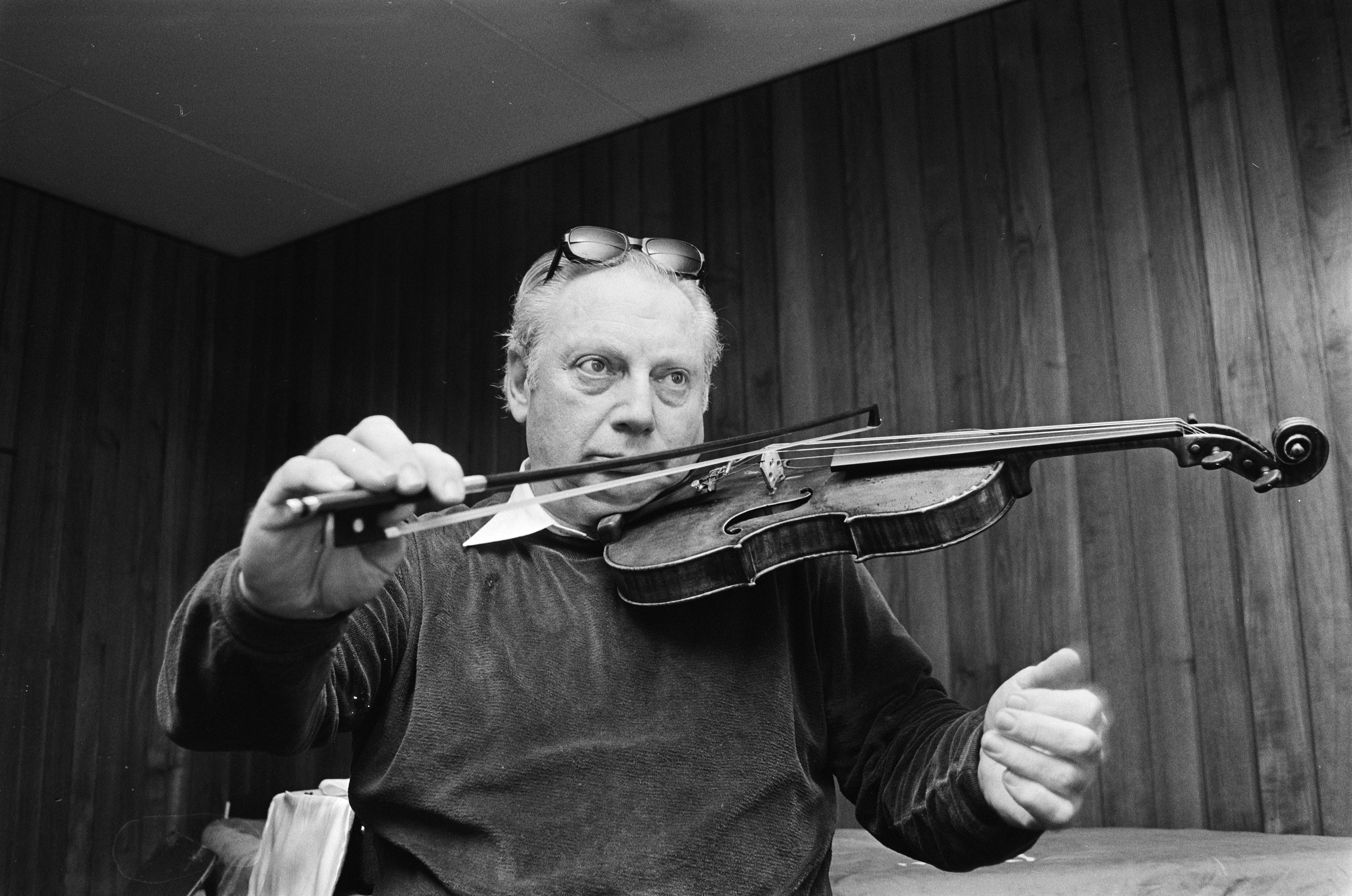 Violist Isaac Stern speelt bij Rotterdam Philharmonisch orkest; Isaac Stern speelt met een hand